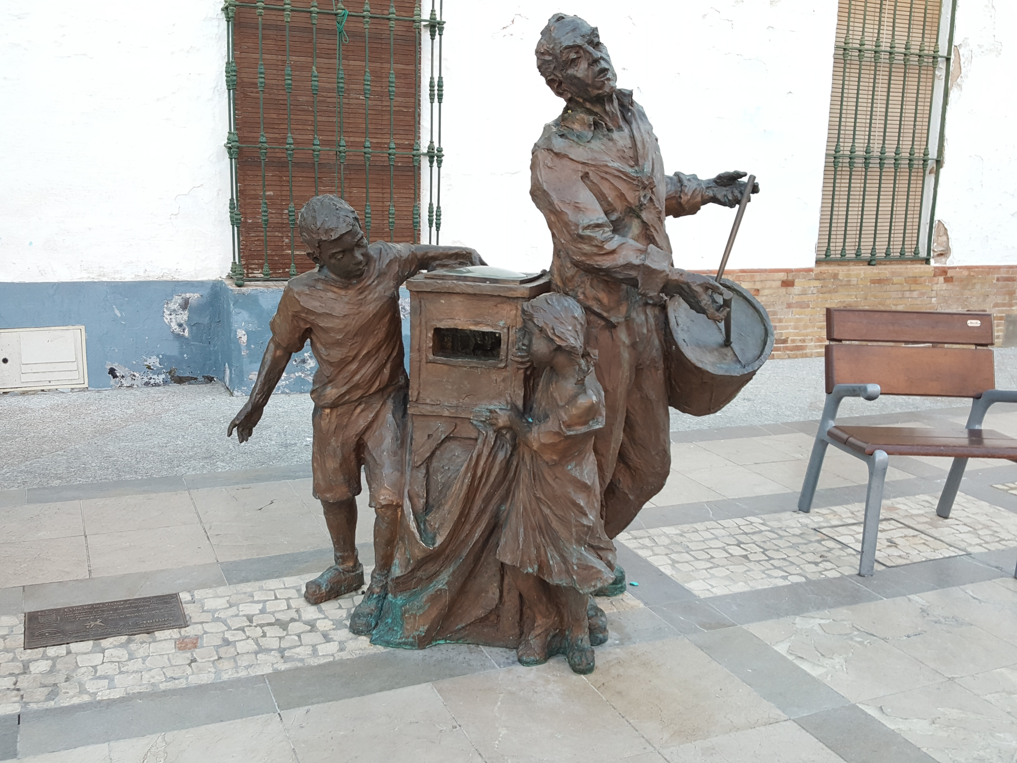 Escultura Perteneciente al Museo, al aire libre Moguer EScultura de Moguer, Andalucía (España). Escultura Incluida en la serie PlateroEScultura con el nombre "El tio de las vistas".